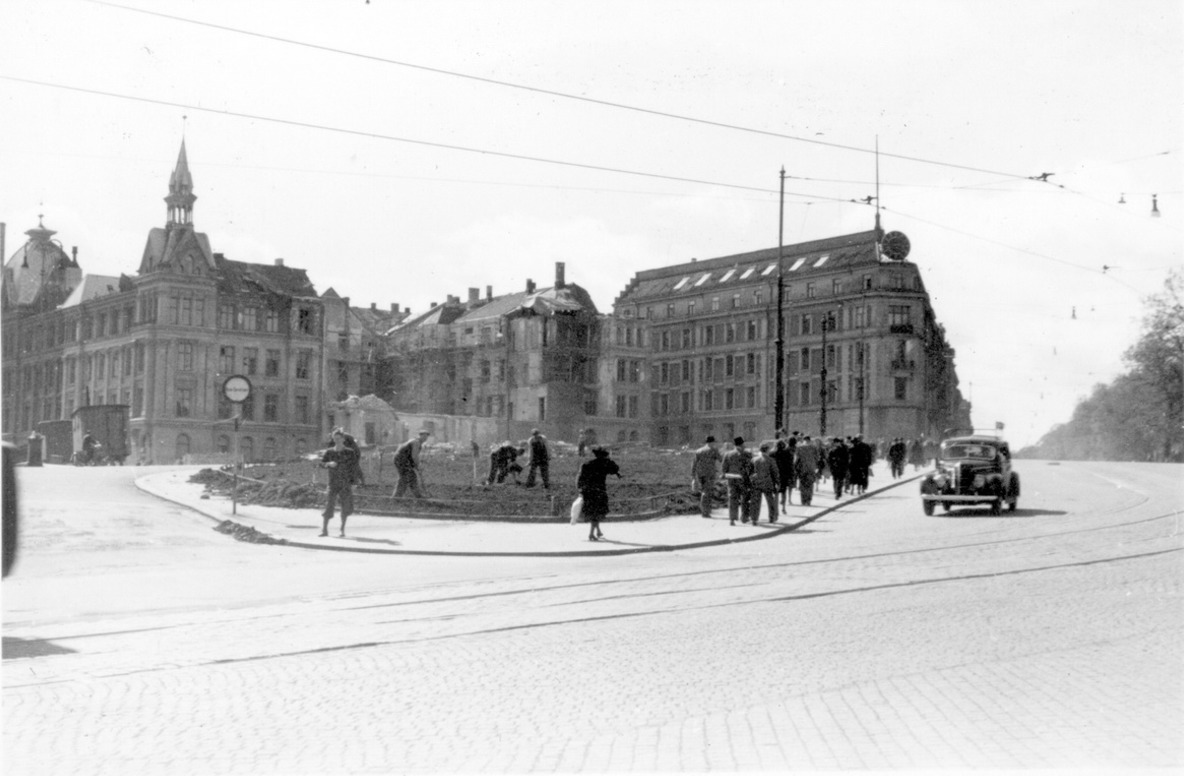 Triangelplassen fotografert etter den andre verdenskrig. I bakgrunnen ruin etter Drammensveien 2, som ble feilbombet nyttårsaften 1944.